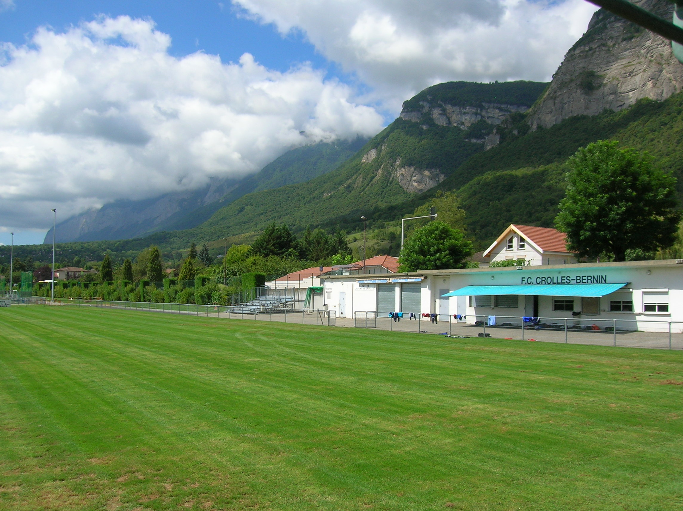 Crolles, Isère, France. terrain de football FC Crolles Bernin